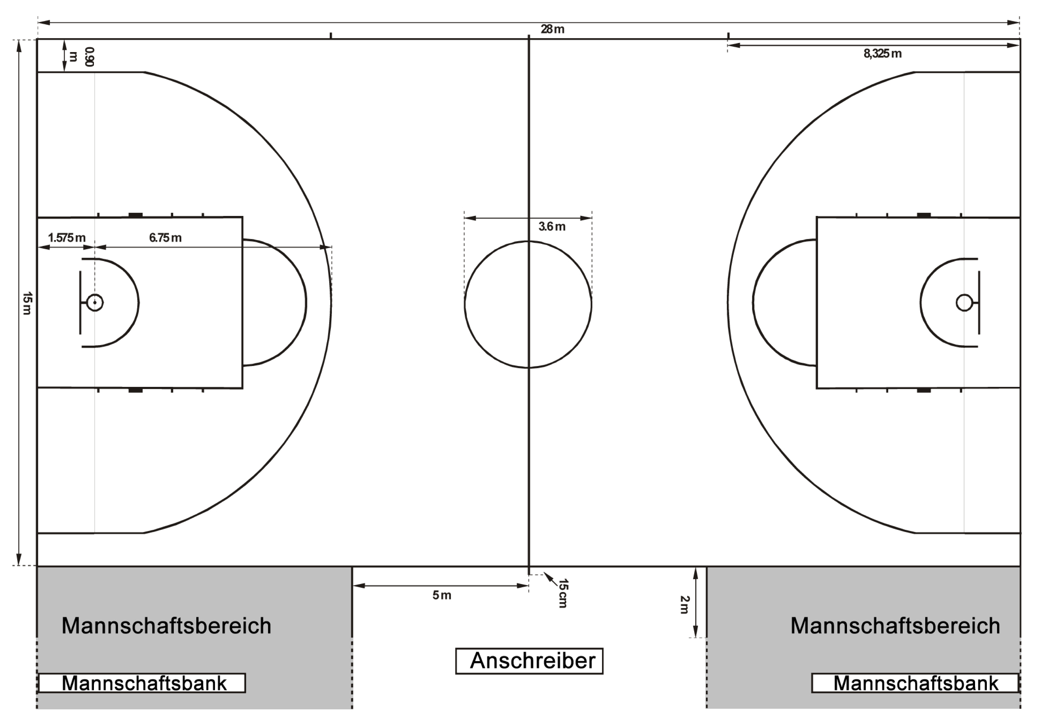 Diagram of a FIBA basketball court as of 2010